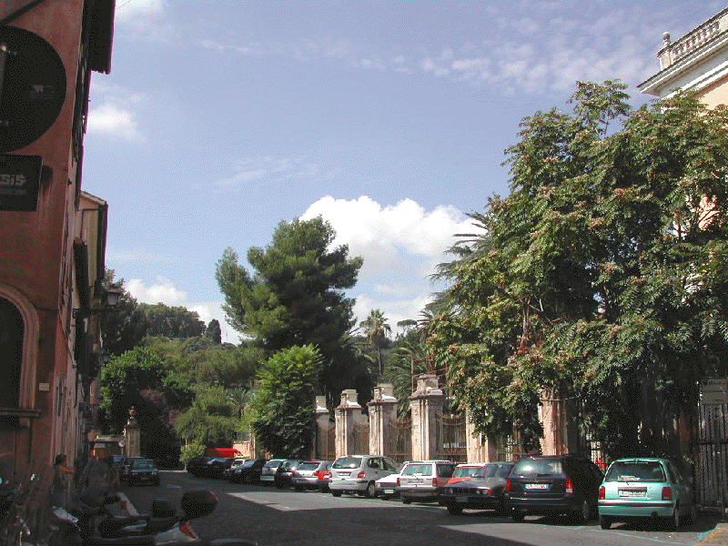 Roma, Trastevere: largo Cristina di Svezia. In fondo,l'ingresso all'Orto botanico; a destra, palazzo Corsini.